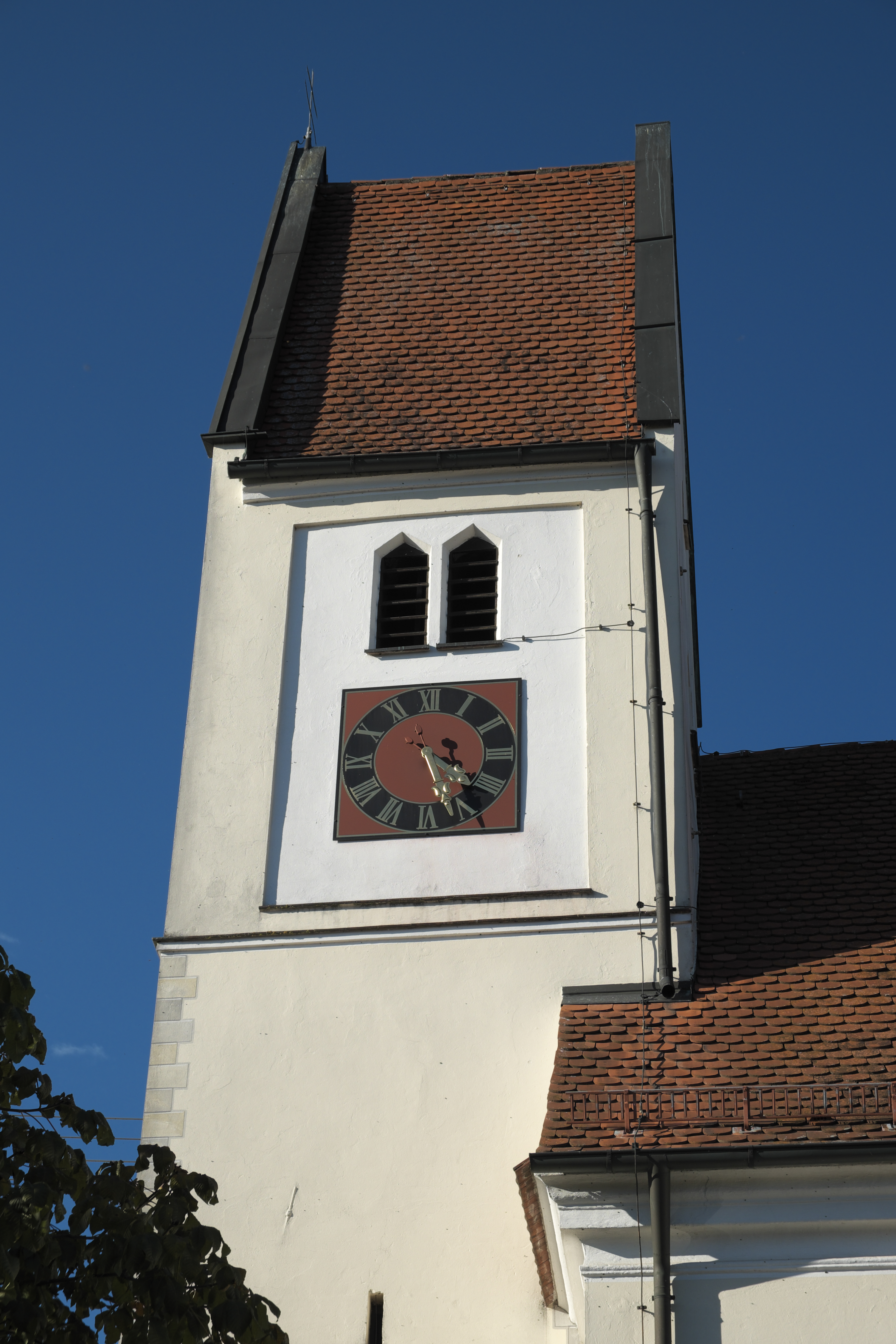 Katholische Kirche St. Andreas in Gremheim, einem Ortsteil von Schwenningen, Satteldachturm